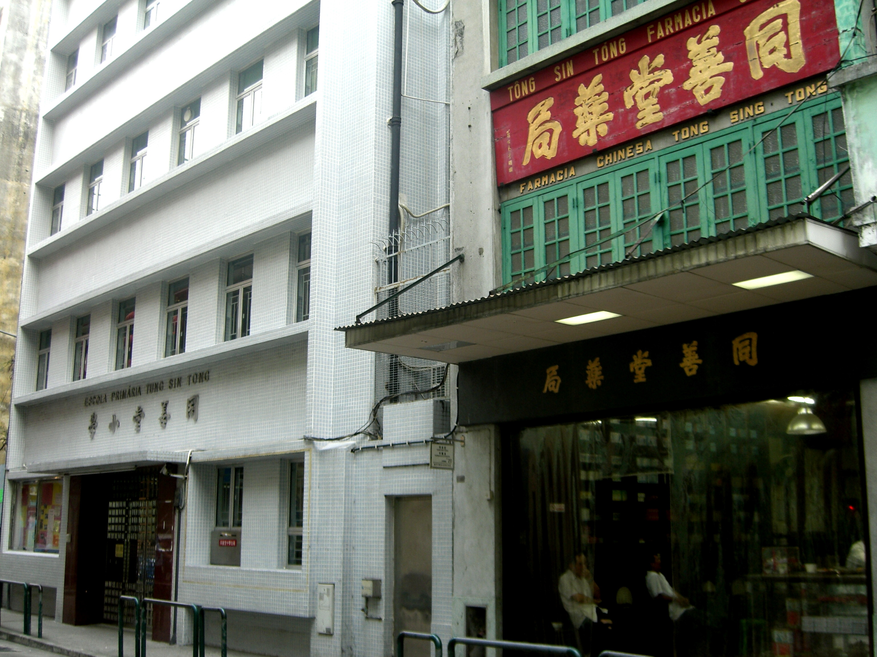 Escola Primária e Farmacia Chinesa "Tong Sin Tong"